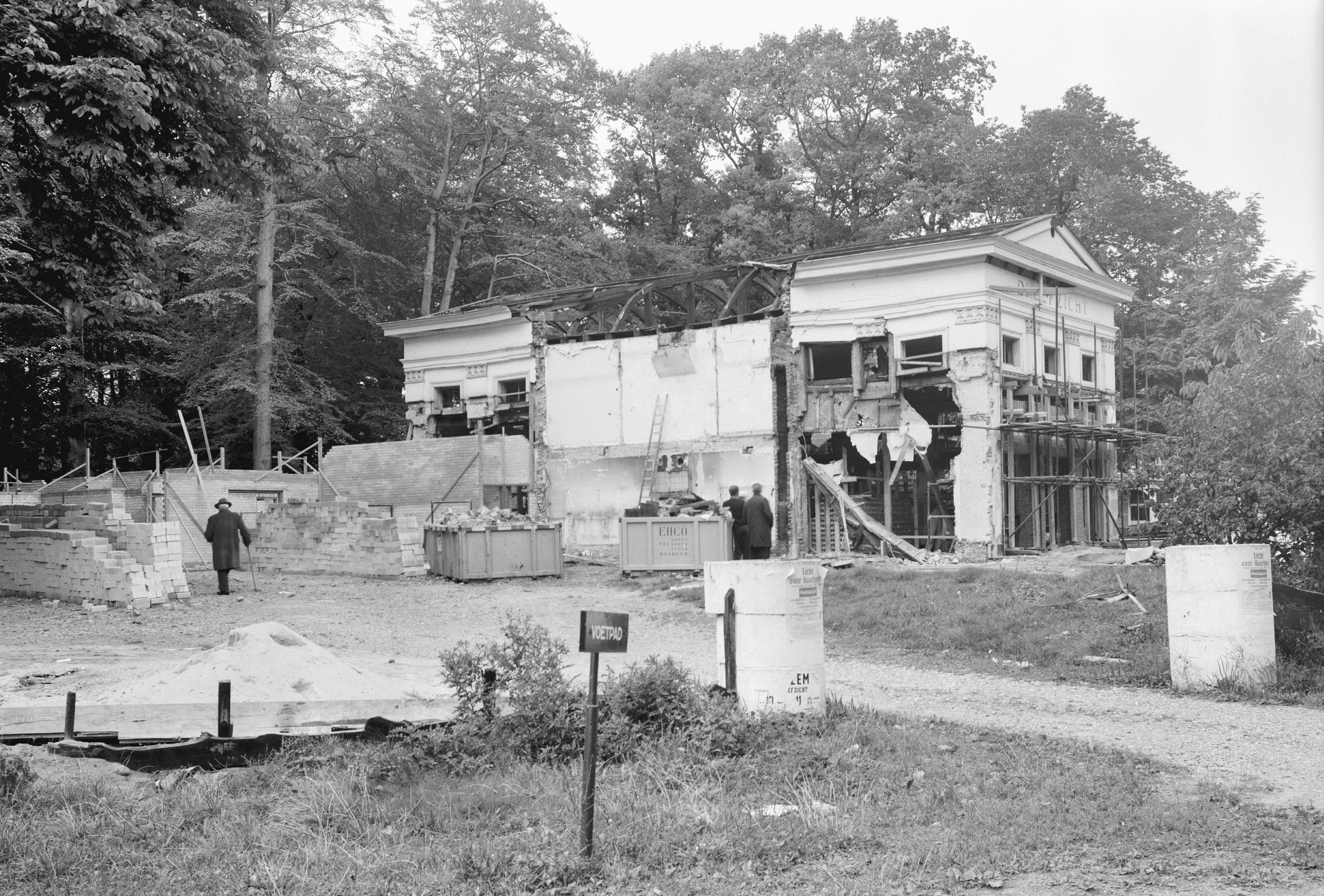 Dreefzicht (sloop)